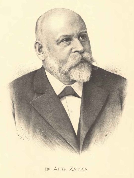 Portréty českých osobností od Jana Vilímka